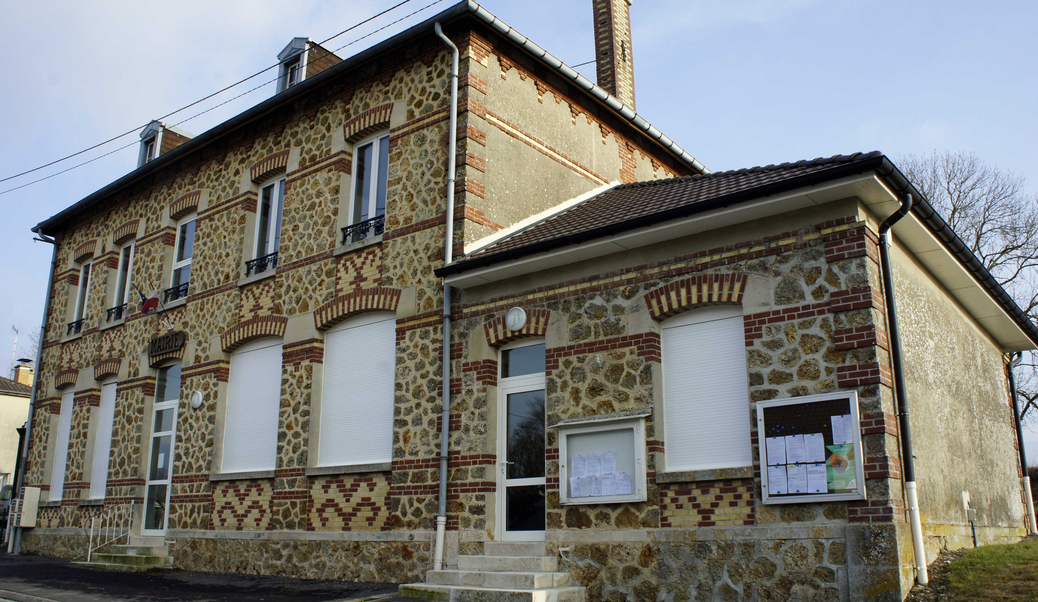 Herpont la Mairie.